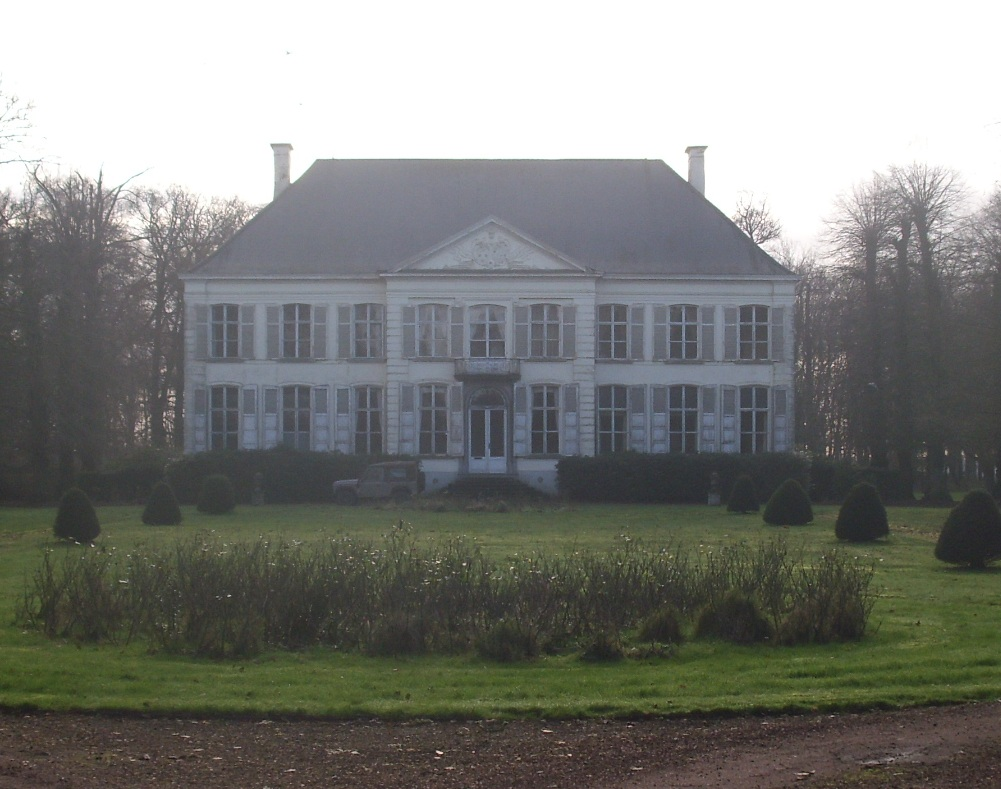 Kasteel van Nazareth - Kasteelstraat - Nazareth - Oost-Vlaanderen - België